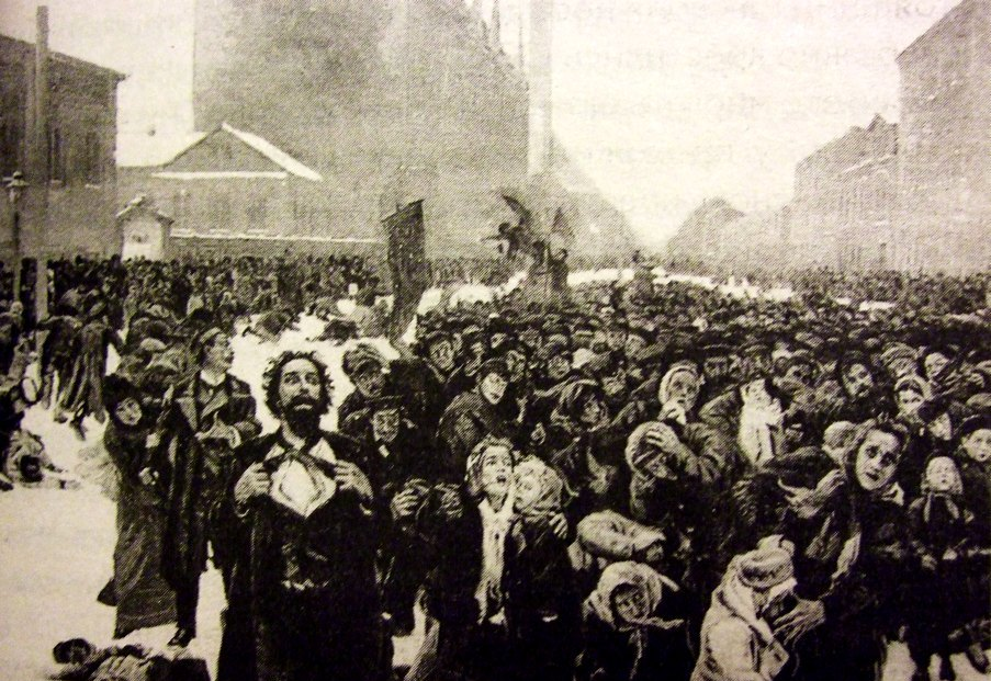 Этюд картины В. Е. Маковского "9 января 1905 года на Васильевском острове"